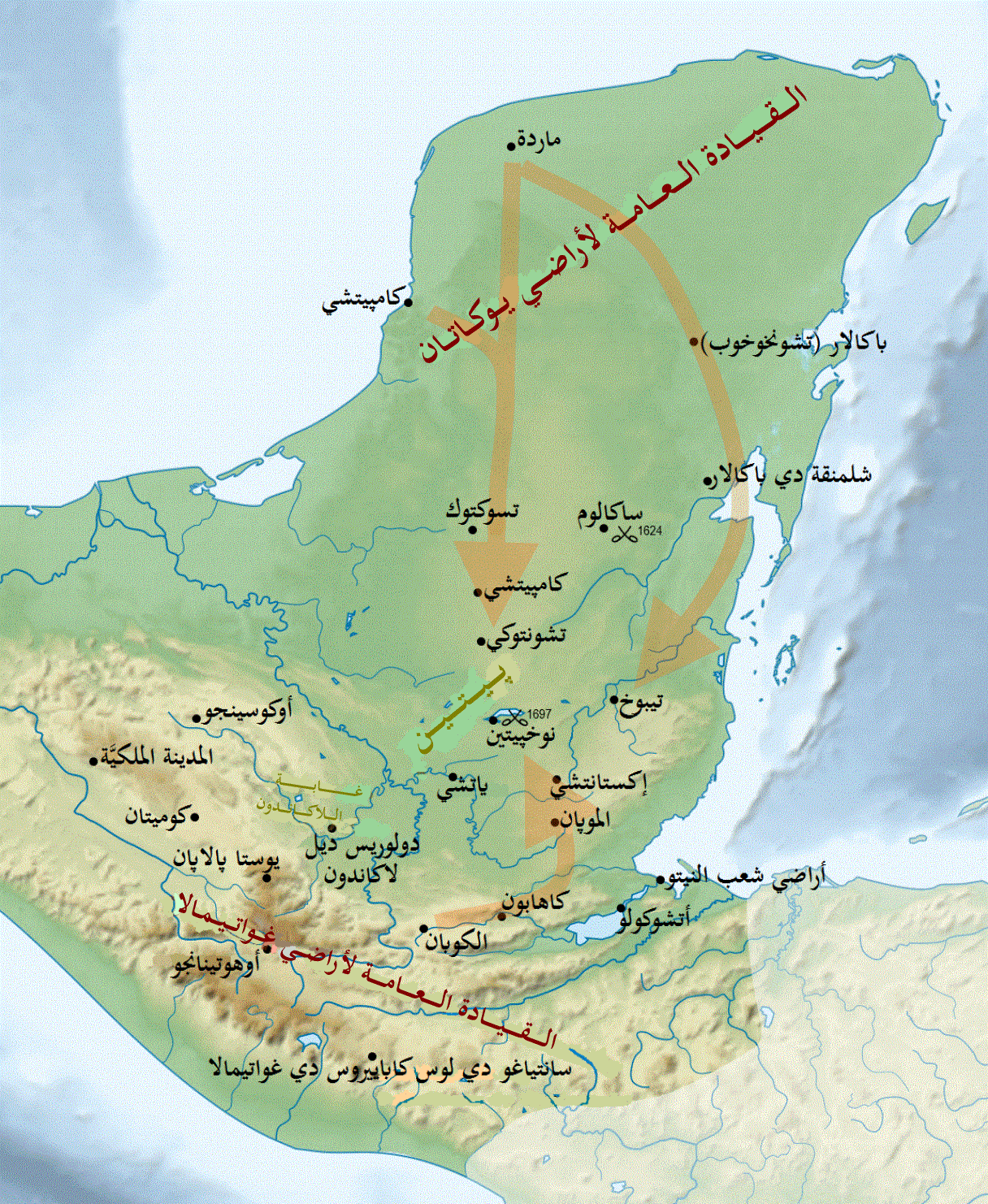 طرق دخول الإسباني إلى بيتين في القرن السابع عشر من يوكاتان ومن غواتيمالا، في سبيل غزو شعب الإيتزا شديد النُزوع إلى الاستقلال.